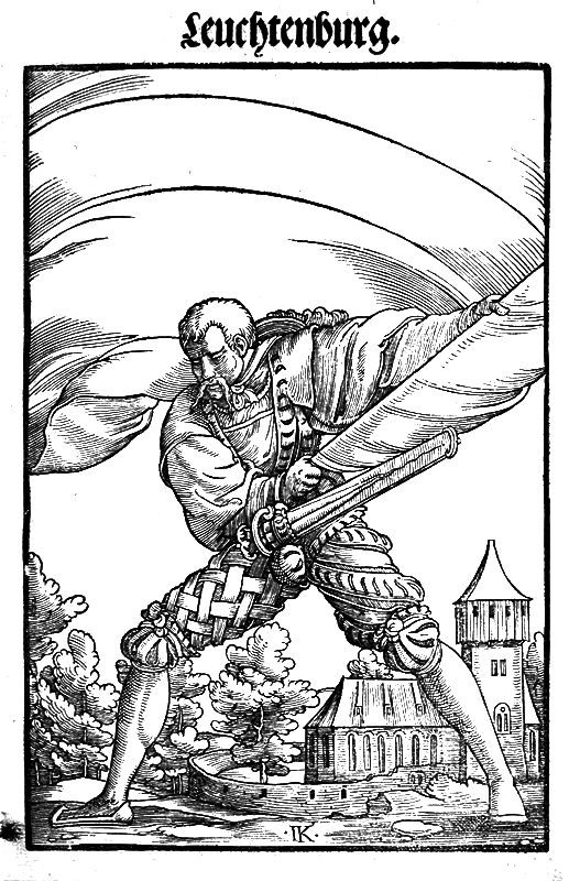 Landsknecht,paralı asker,salondan alınabilir..